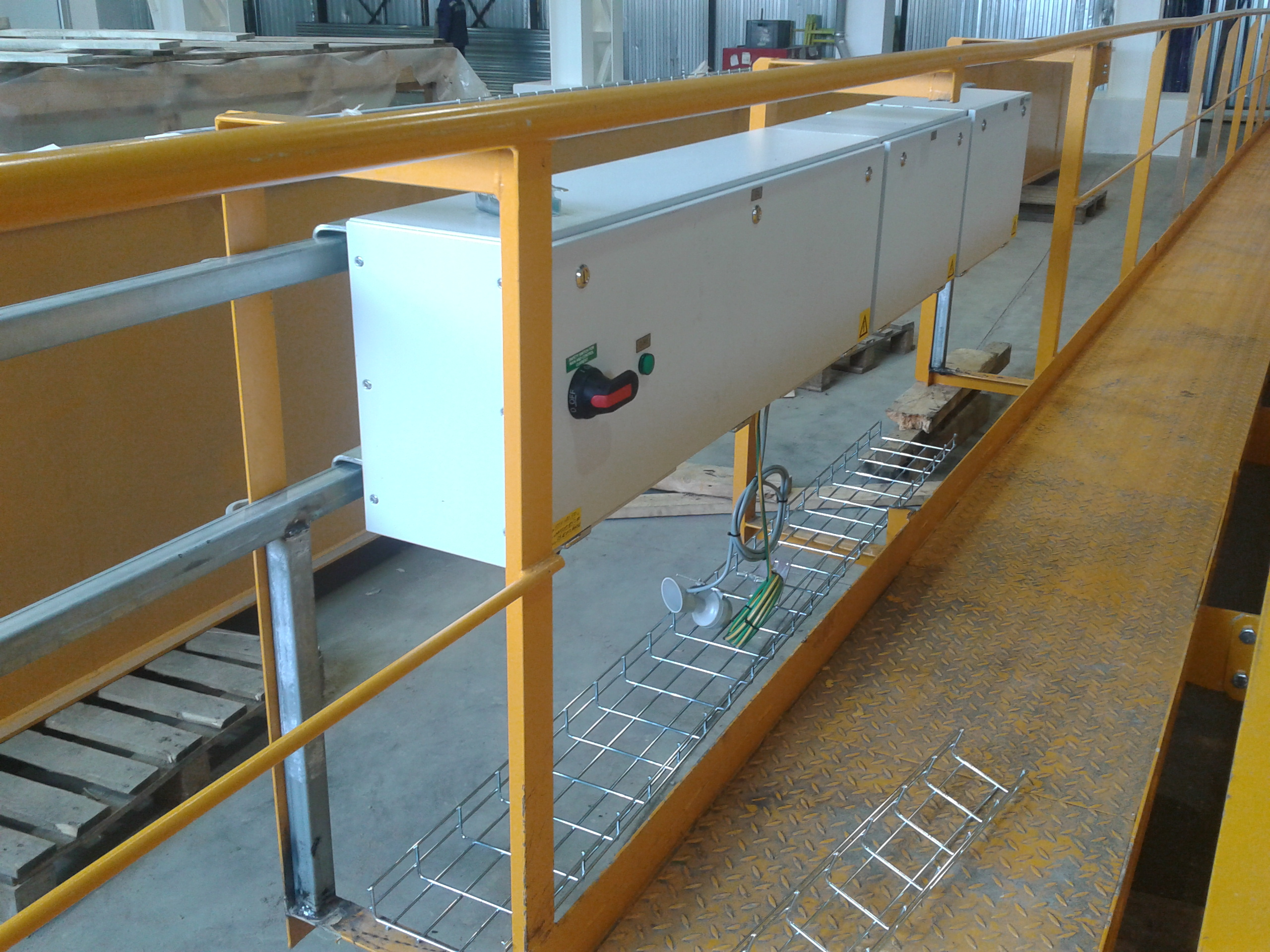 elektroomara na mostu dvigala, vir 30t+30t Russia/Kaluga.